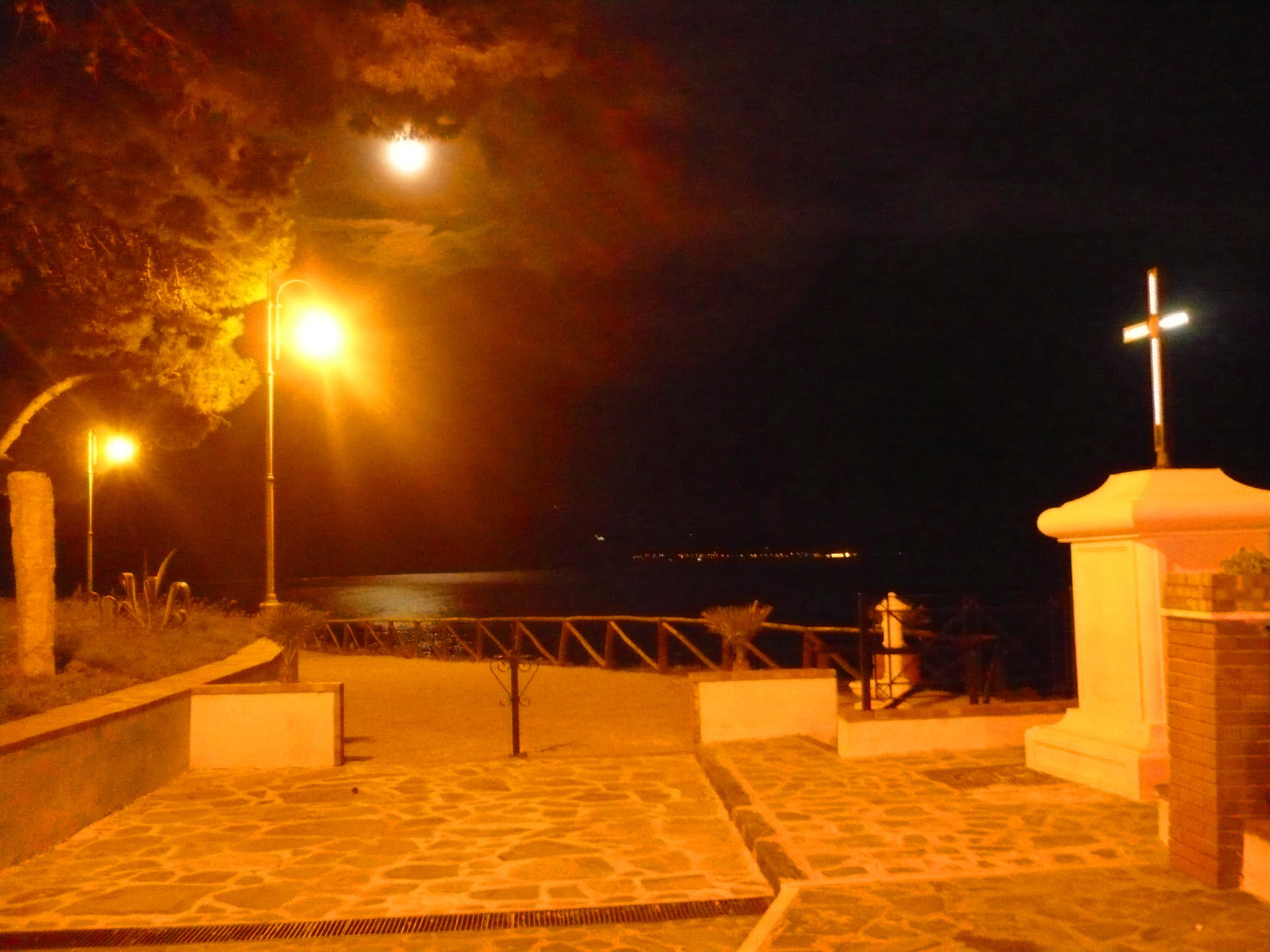 Croce luminosa posta a piazza giovanni paolo II a ogliastro marina, frazione di castellabate (salerno)